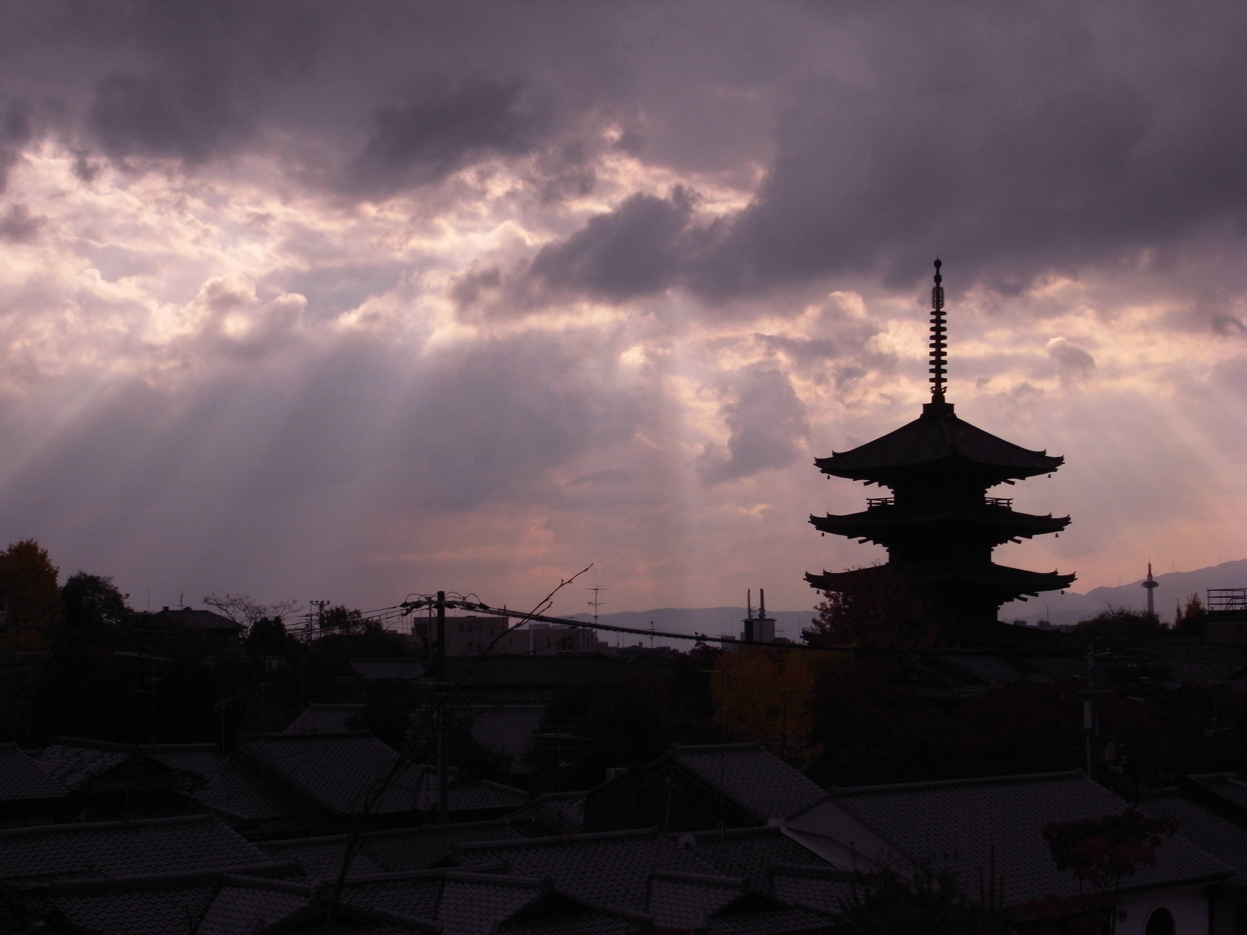 京都・法観寺の五重塔。高台寺から撮影。